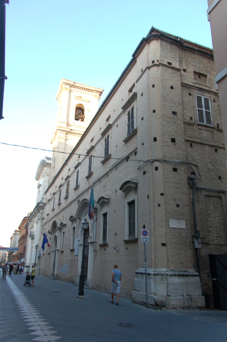 Chieti City 2011